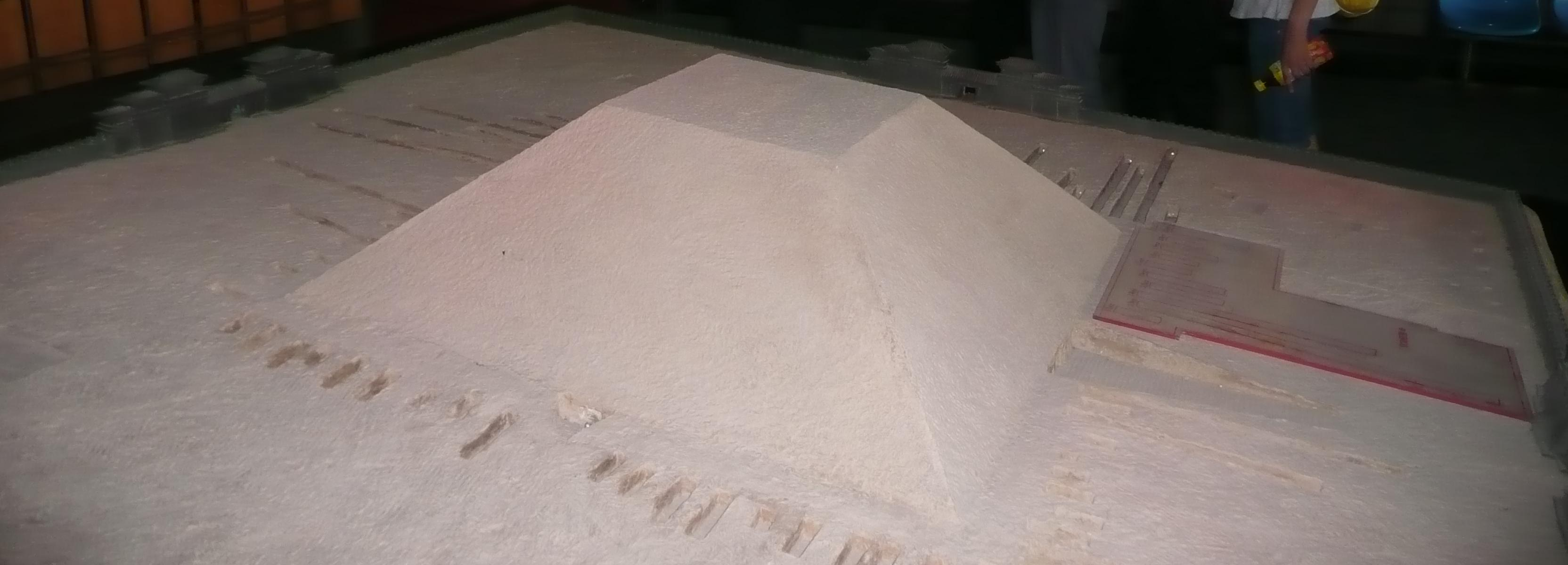 Fragmento de image:Han Yang Ling 02.JPG.